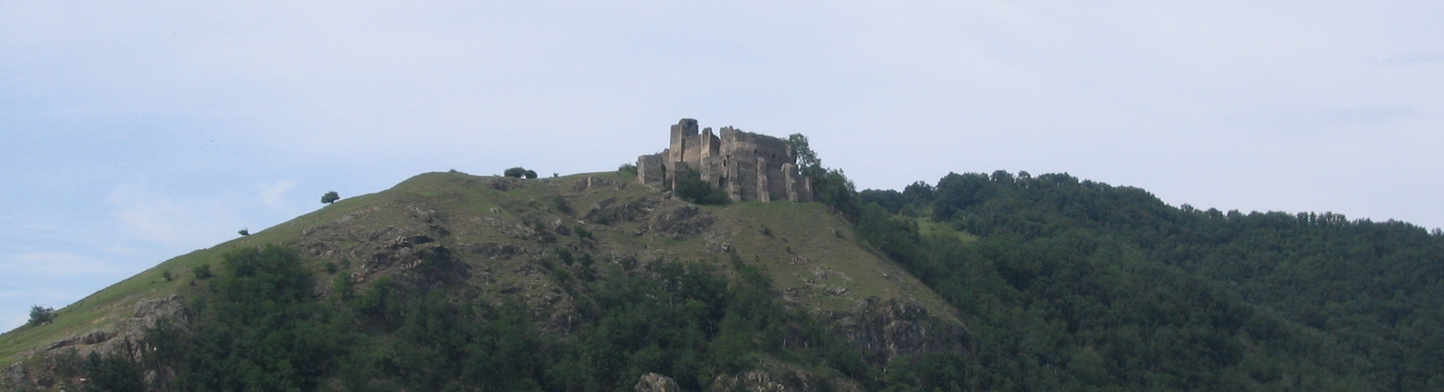 Cettea Soimos, jud Arad